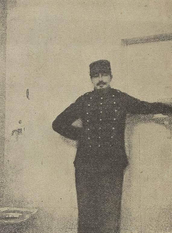 "Dubuc, en artilleur dans sa cellule".